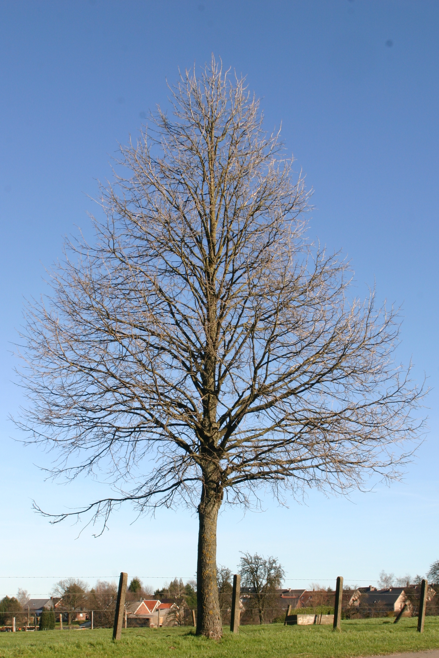 Jonk Lann mat der typescher Pyramideform am Wanterkleed.